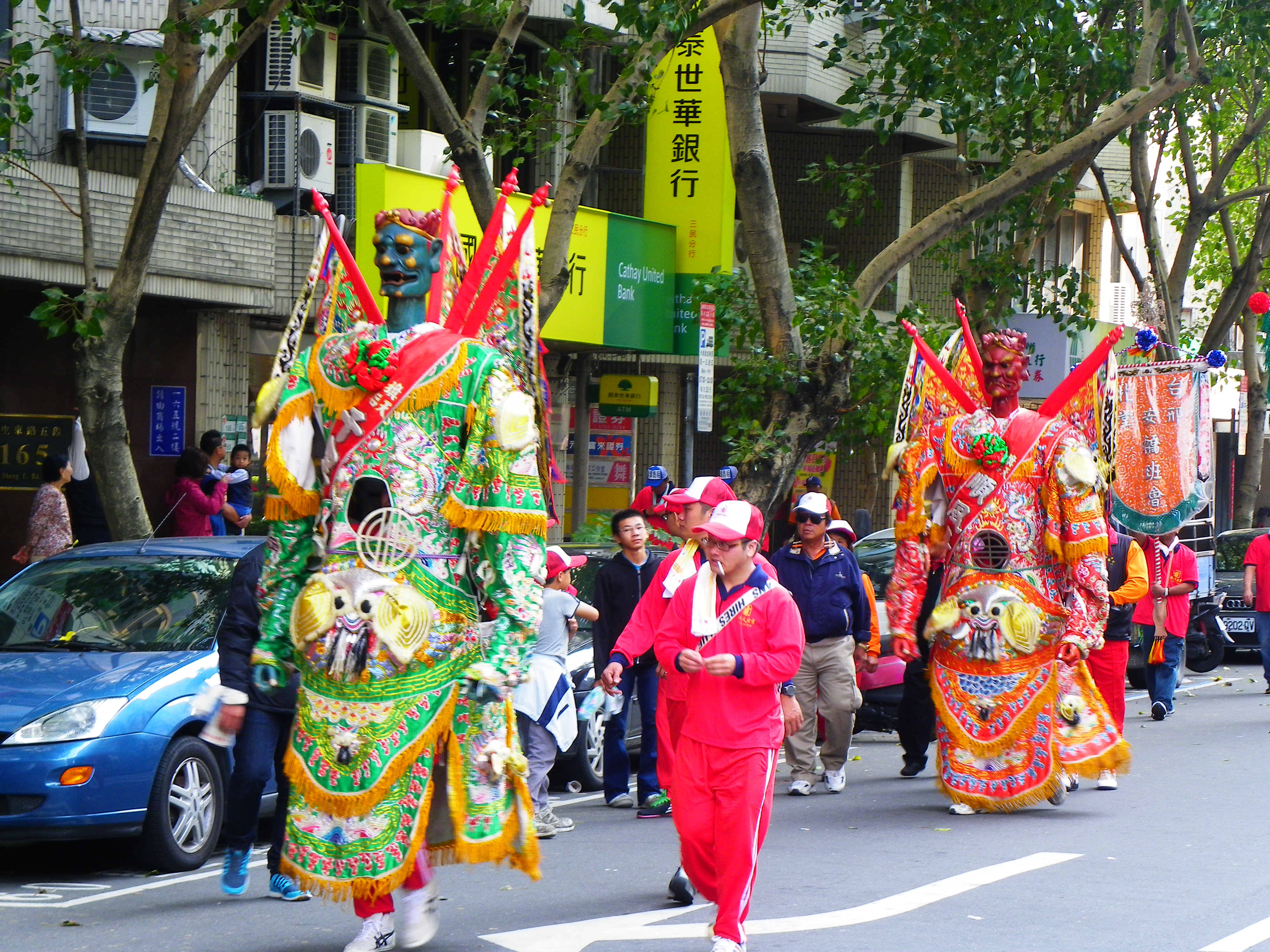 中文（台灣）: 松山慈祐宮建宮260週年紀念媽祖遶境，接近民生圓環的旗津天后宮千里眼、順風耳。